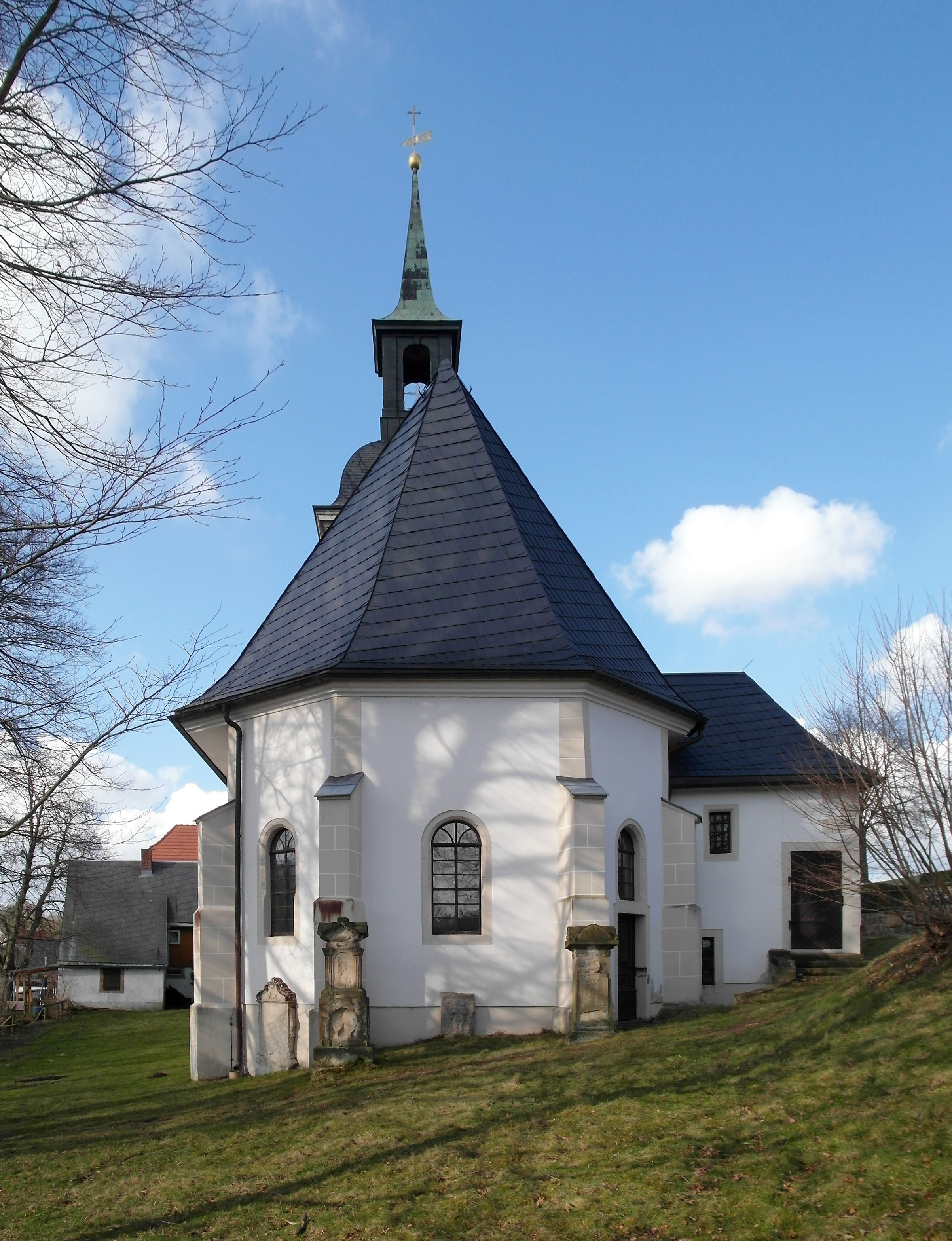 13.02.2018 01833 Dittersbach (Dürrröhrsdorf-Dittersbach), Hauptstraße 111: (GMP: 51.036563,13.988027) Evangelische Kirche. Nach dem Brand von 1660 wurde die 1662 heutige Kirche errichtet. Der Kirchturm wurde erst 1722 fertig. Innen eine Orgel von Gottfried Silbermann aus dem Jahre 1726. Sicht von Osten. [SAM3957.JPG]20180313325DR.JPG(c)Blobelt